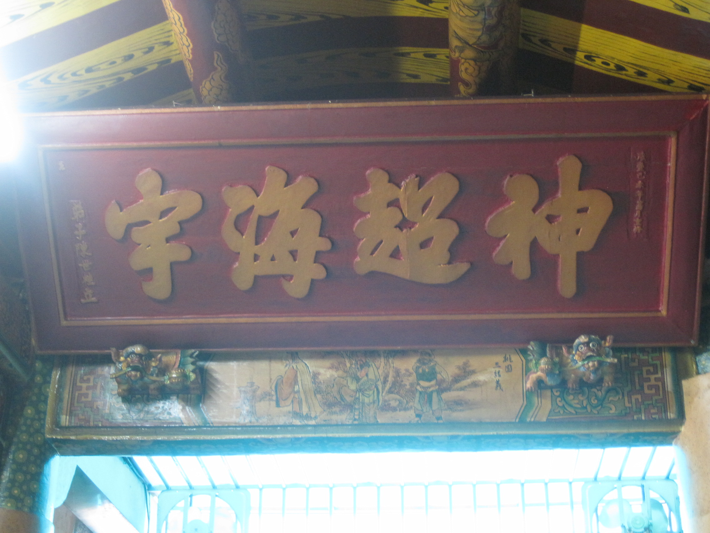 武當山上帝廟神超海宇匾